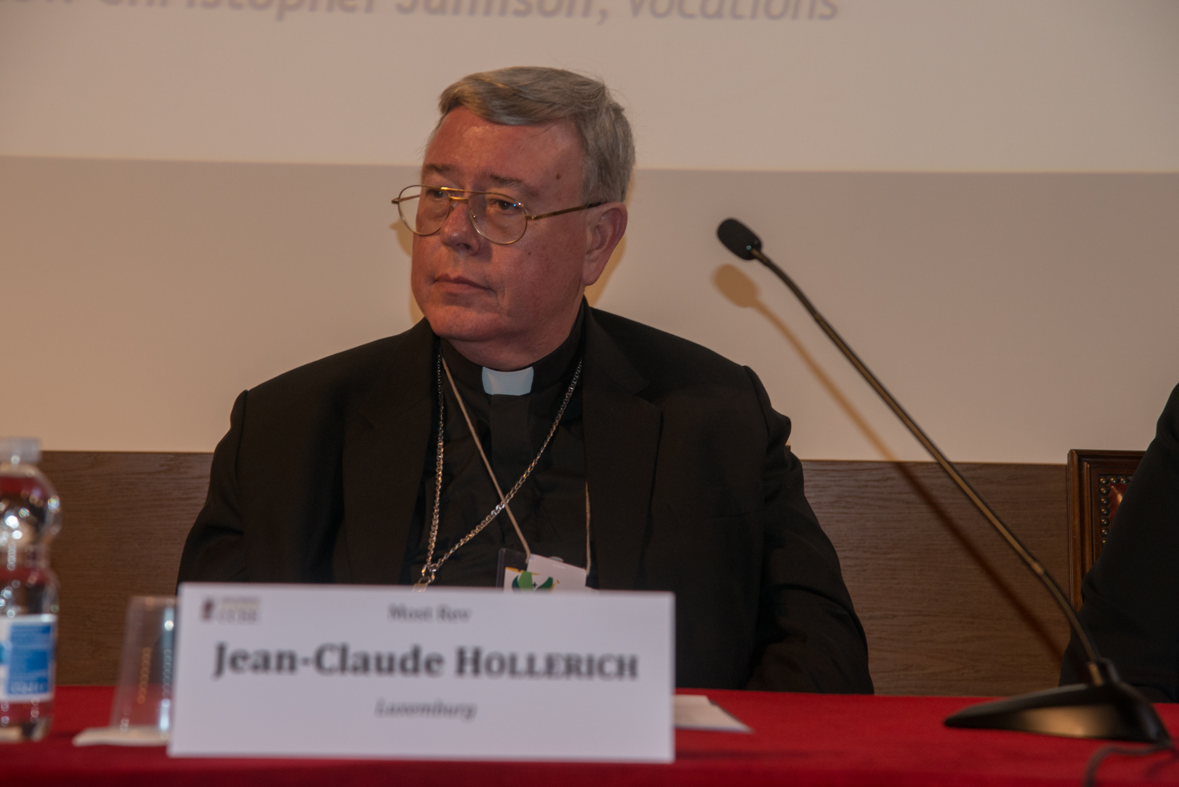 Jean-Claude Hollerich es obispo de Luxemburgo.